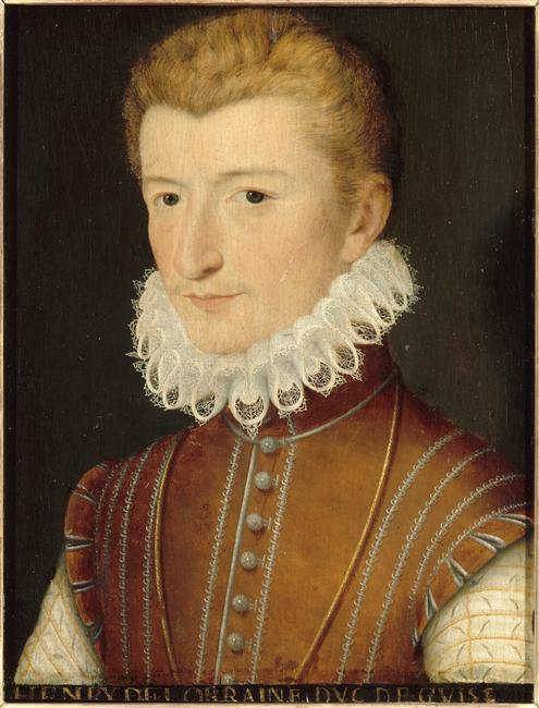 Henri Ier de Lorraine (1550-1588), 3ème duc de Guise en 1566, dit le Balafré, chef de la Ligue (1550-1558)